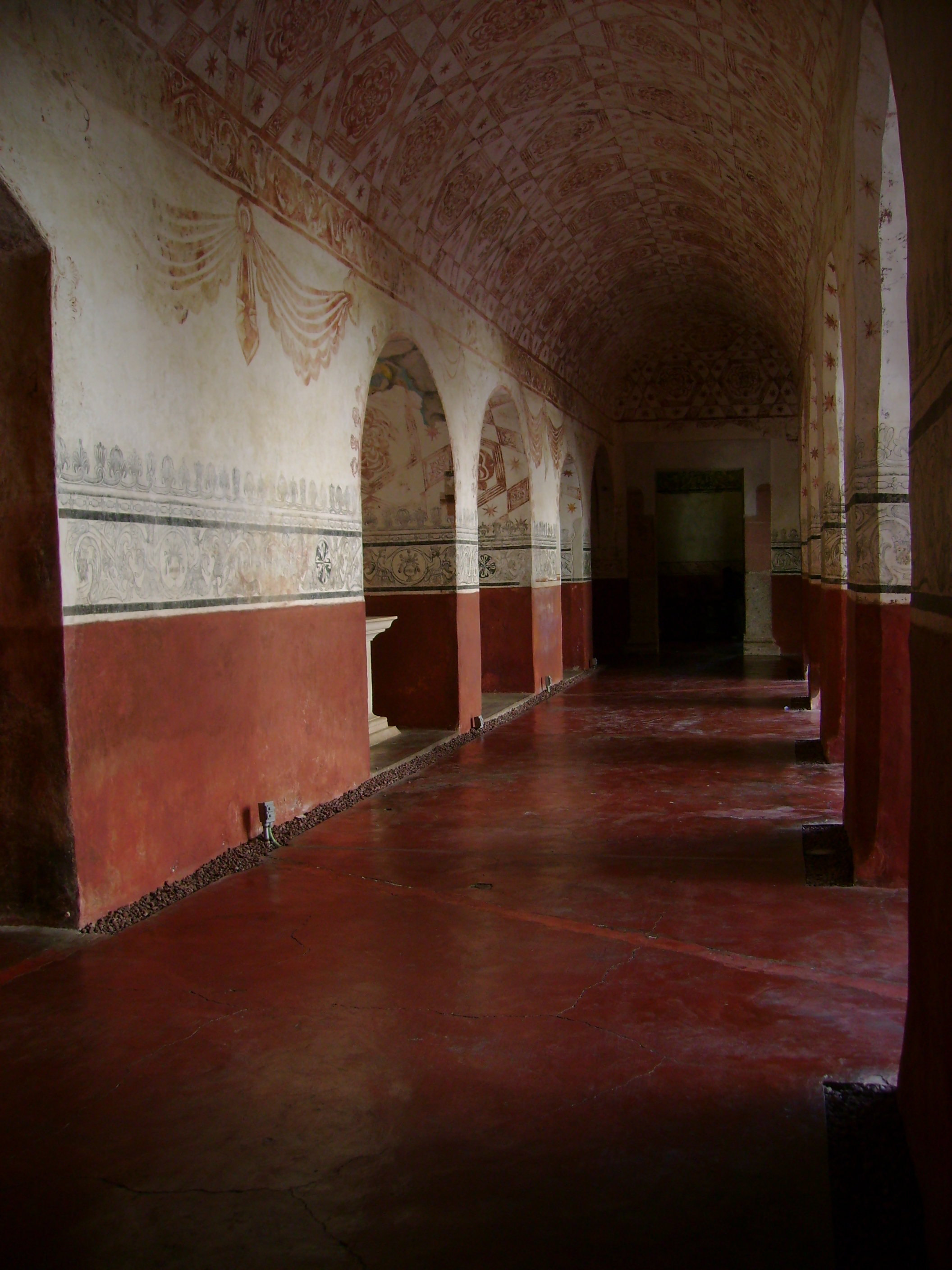 Templo y Antiguo Convento de la Natividad, pasillos interiores con frescos